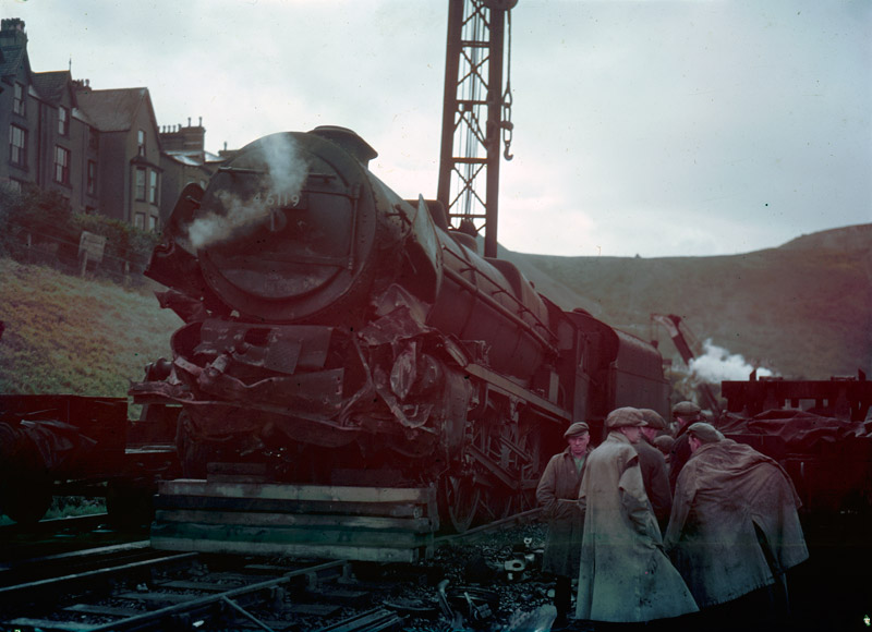 Teitl Cymraeg/Welsh title: Damwain trên Post Gwyddelig ym Mhenmaenmawr, 27 Awst 1950 Ffotograffydd/Photographer: Geoff Charles (1909-2002) Dyddiad/Date: 27/8/1950 Cyfrwng/Medium: Negydd ffilm / Film negative Cyfeiriad/Reference: (gch18703) Rhif cofnod / Record no.: 3370745 Rhagor o wybodaeth am gasgliad Geoff Charles yn Llyfrgell Genedlaethol Cymru More information about the Geoff Charles Collection at the National Library of Wales Mae ffotograffau Geoff Charles hefyd yn rhan o Broject Europeana Libraries Geoff Charles' photographs also form part of the Europeana Libraries Project